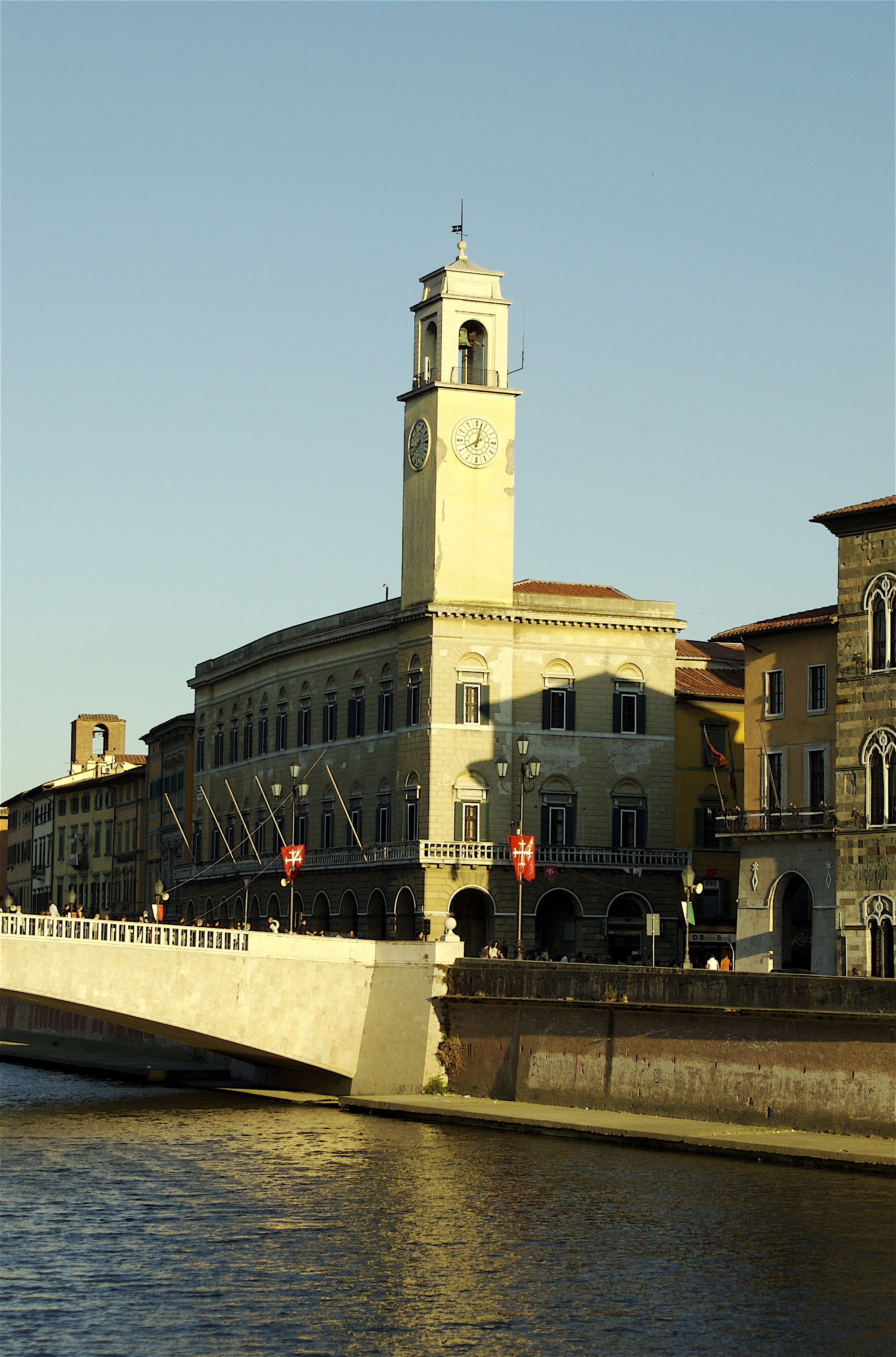 Palazzo Pretorio, Pisa, Toscana, ItaliaPisa